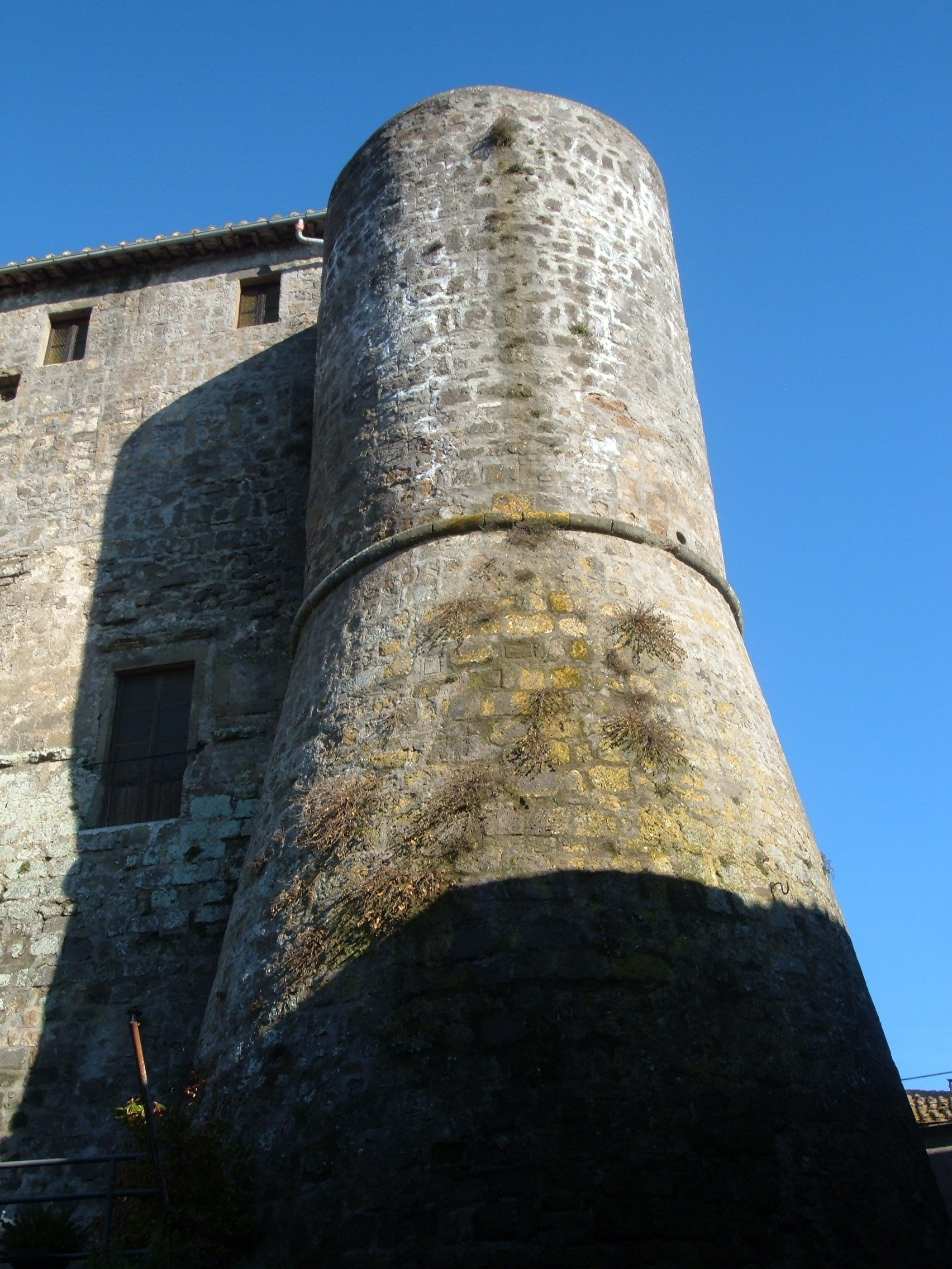 Ronciglione_-_Torrioni